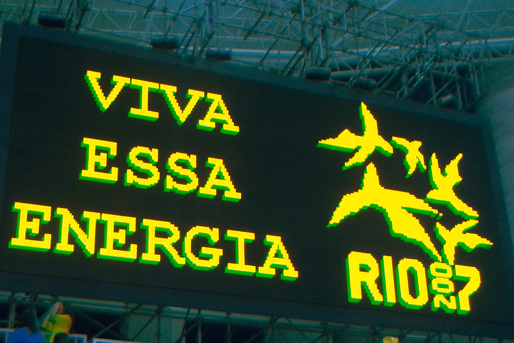 Placar eletrônico temporário nos Jogos Pan-americanos de 2007 no Estádio Olímpico João Havelange, Engenhão.